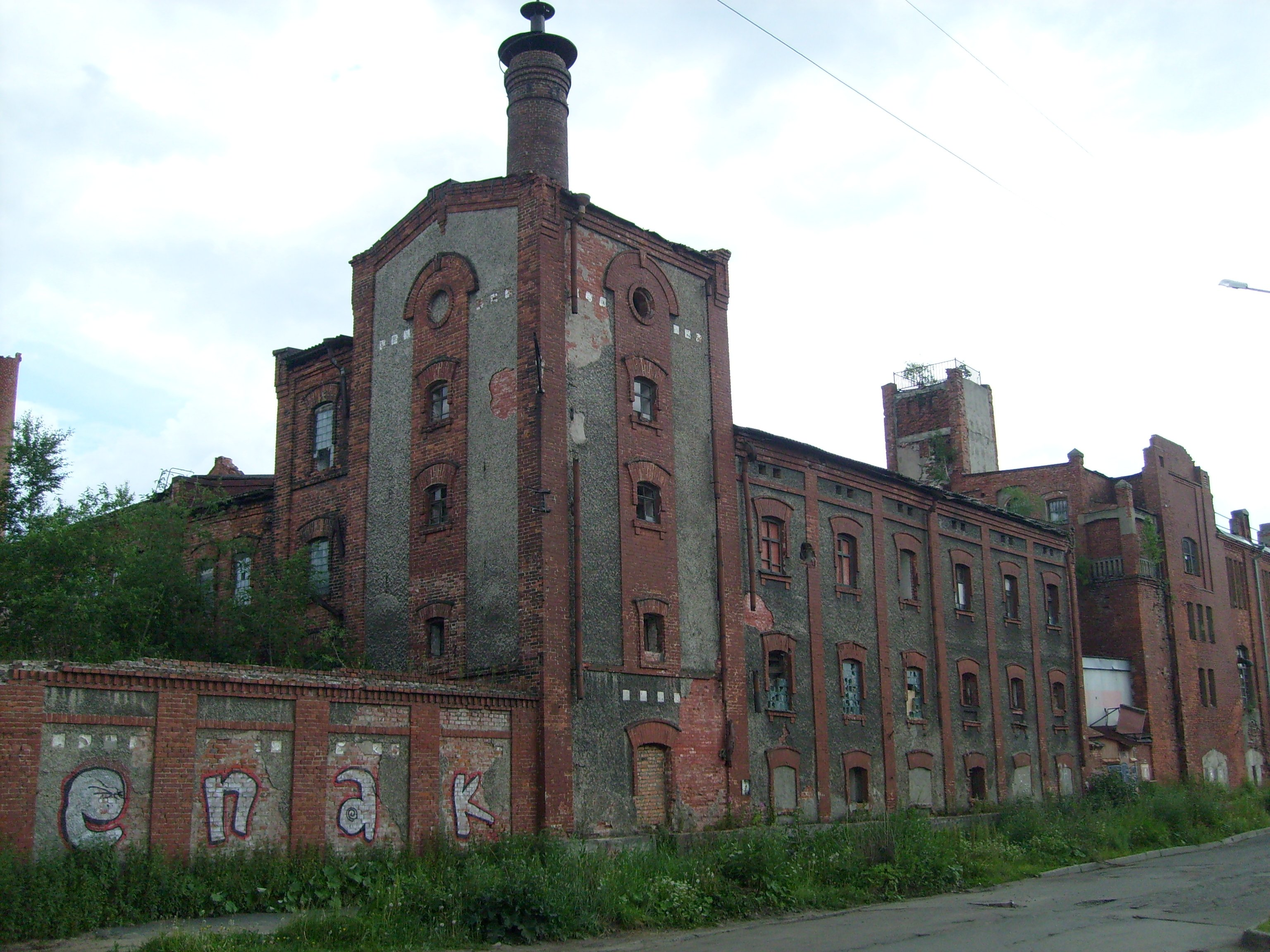 Старое здание Пивного завода в Архангельске на улице Попова, д. 3. Пивоваренный завод Суркова А. Ю., памятник архитектуры Архангельска, построен в 1883-1913